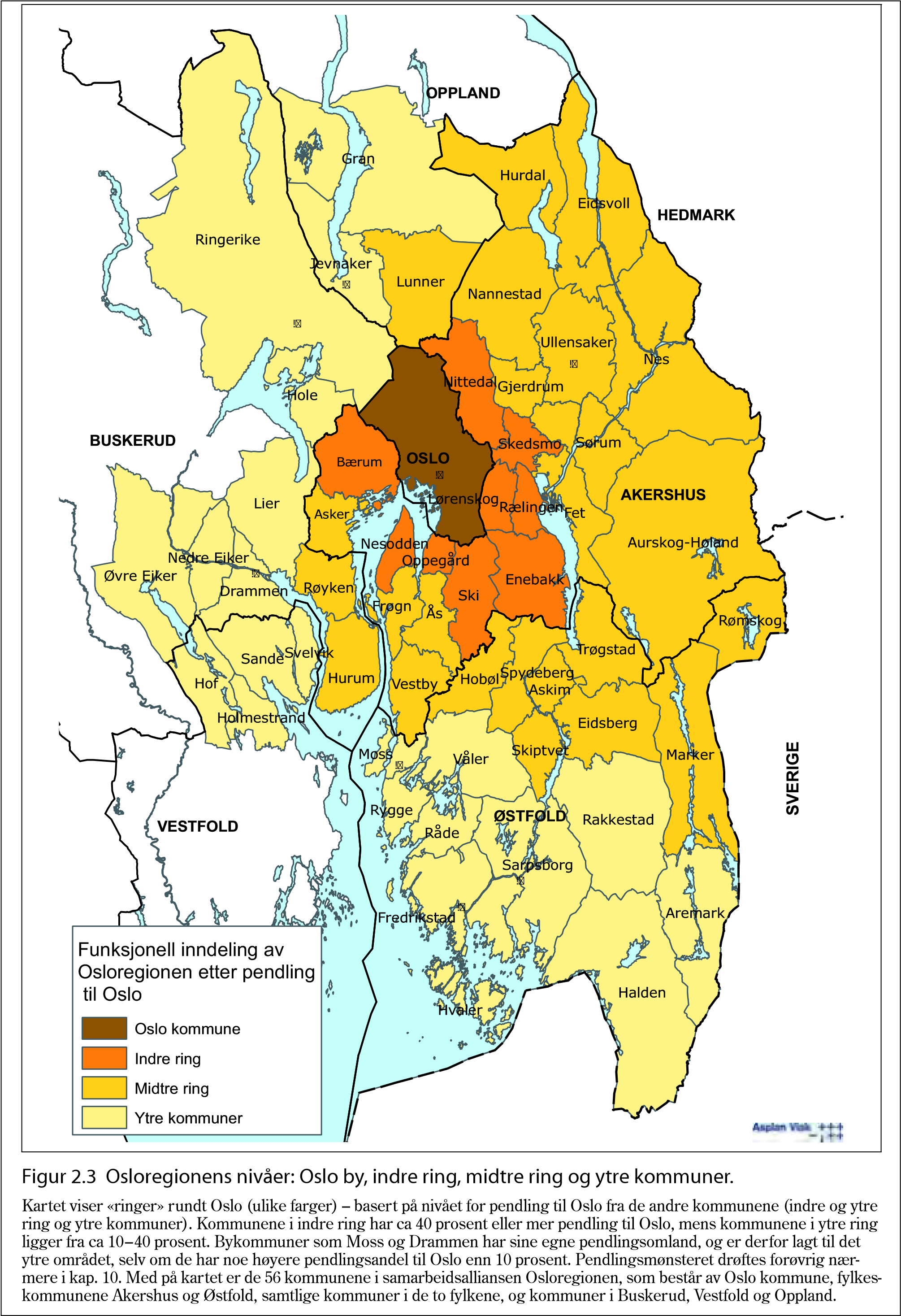 Kart fra St.meld. nr. 31 (2006-2007). Kartet viser en funksjonell inndeling av Osloregionen etter pendlig til Oslo.